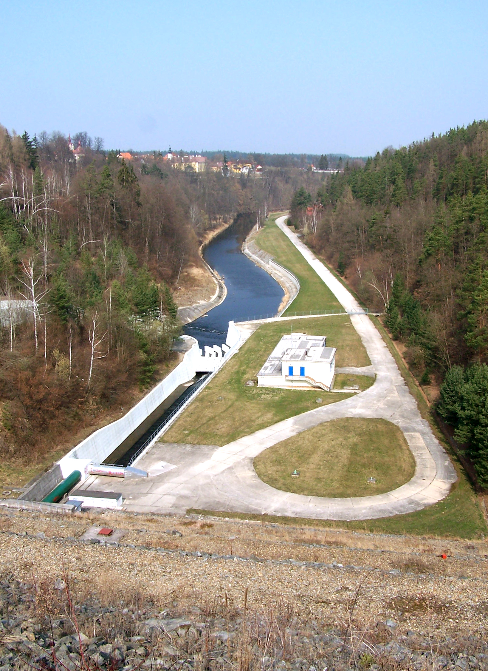 Vodní nádrž pitné vody pro Jihočeský kraj v Římově, v pozadí "Zámeček"